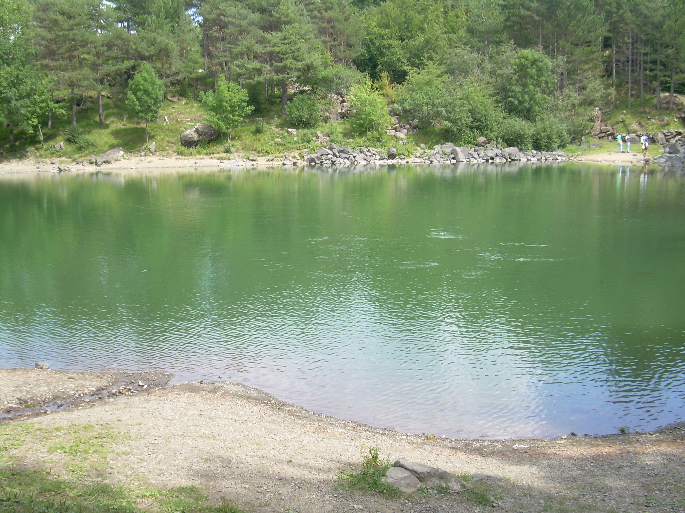 Il Lago delle Lame, in Liguria